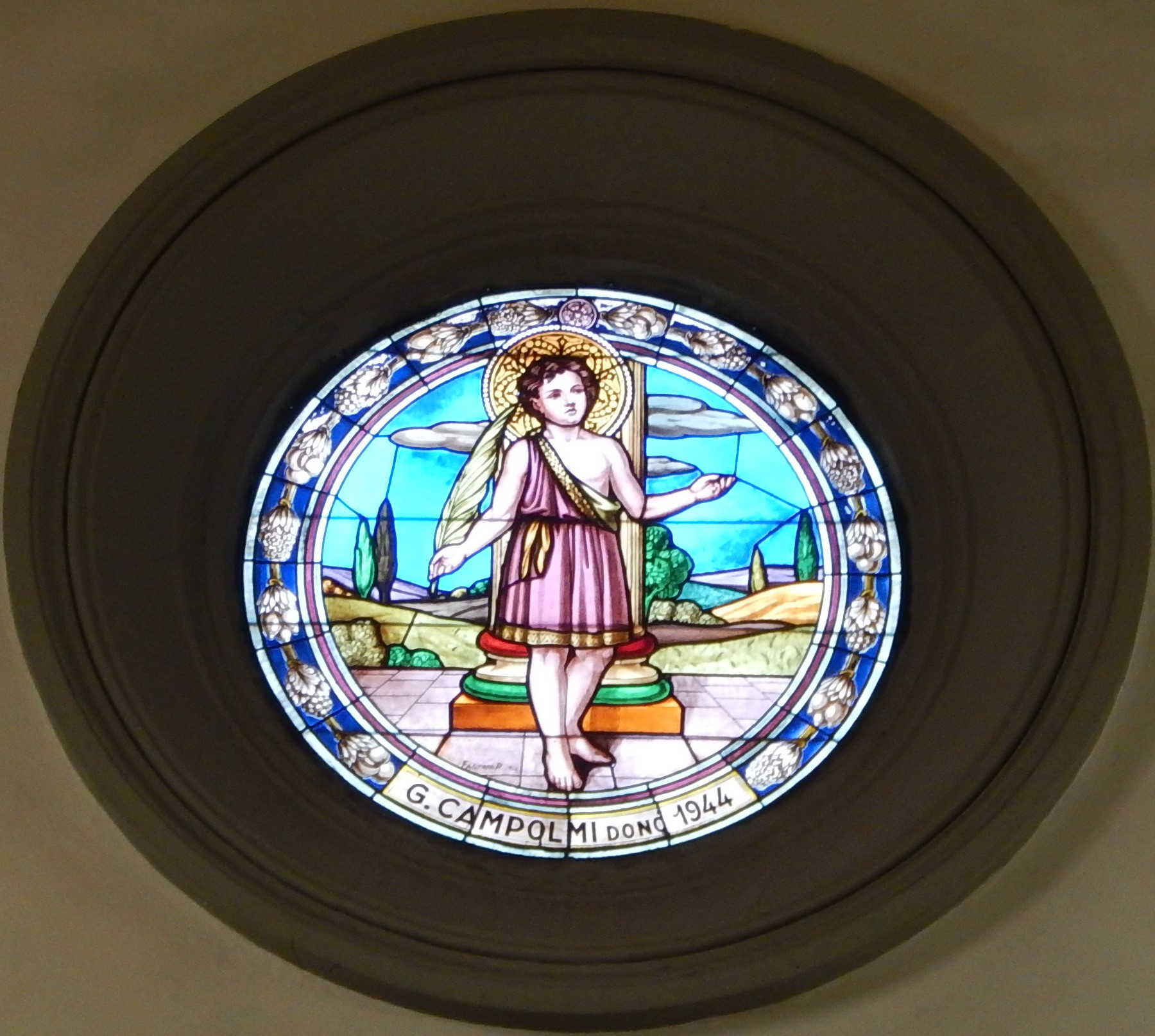 Rosone con vetrata raffigurante San Quirico, risalente al 1944 e dono di Galileo Campolmi